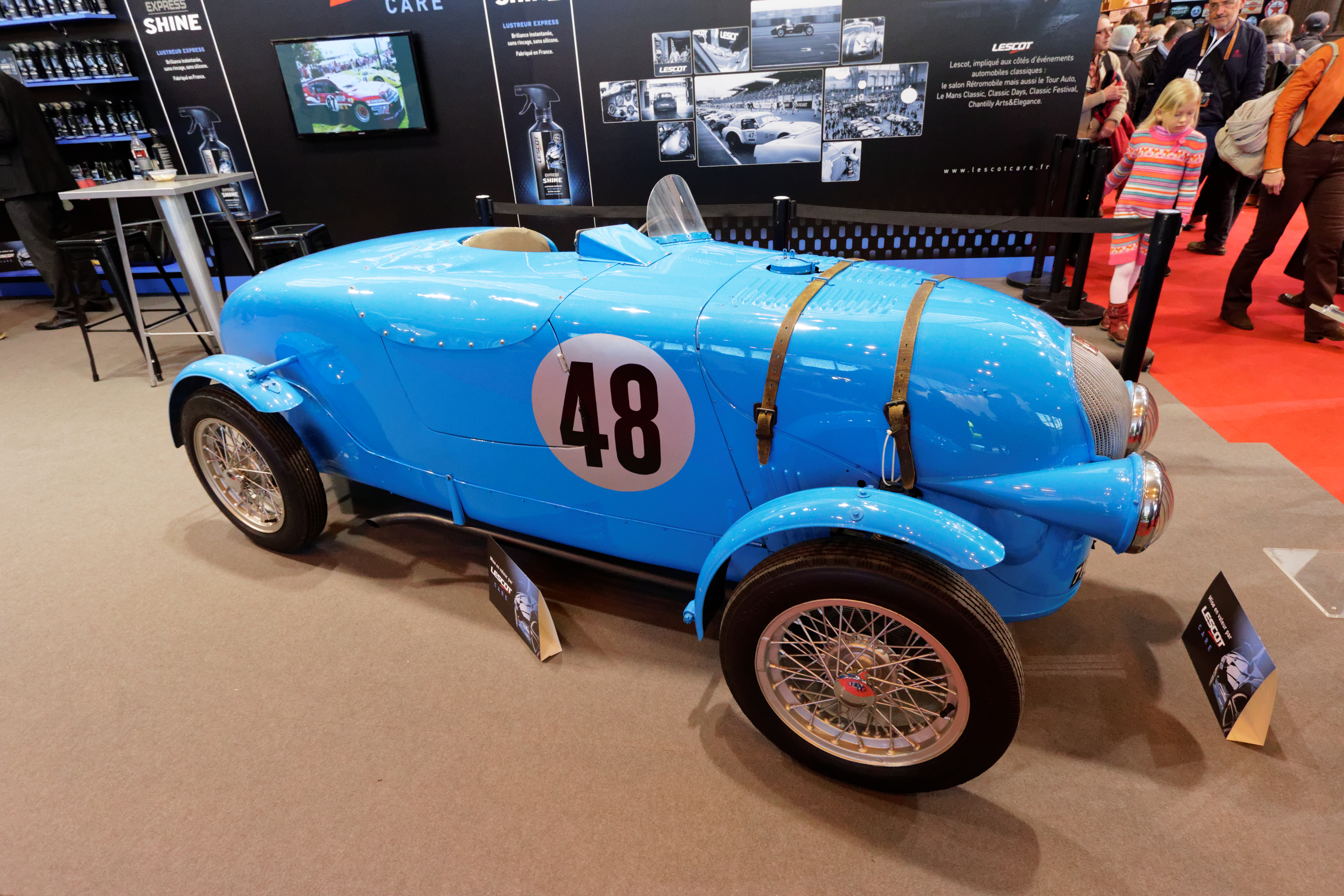 Une des voiture présentée lors du salon Rétromobile de Paris 2015